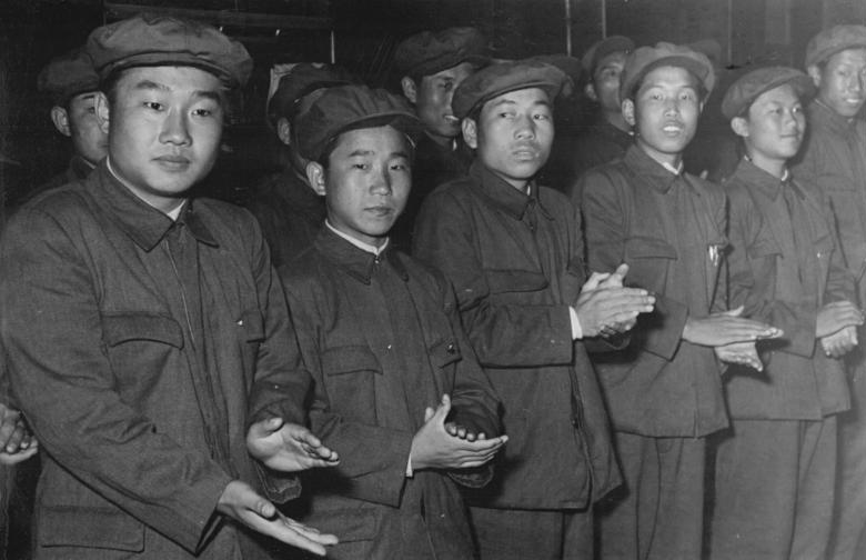 Berlin, Ankunft von koreanischen Gaststudenten Zentralbild Krueger 3.8.1953 Koreanische Jugenddelegation in Berlin eingetroffen 128 junge Koreaner, die auf Einladung der Regierung der Deutschen Demokratischen Republik an der Karl-Marx-Universität Leipzig studieren werden, trafen am 2.8.1953 auf dem Berliner Ostbahnhof ein. Die Delegation wurde von Staatssekretär Harig begrüßt. UBz: Junge koreanische Studenten.